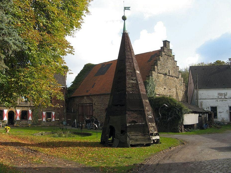 Witten, Schloß Steinhausen - Stallungen